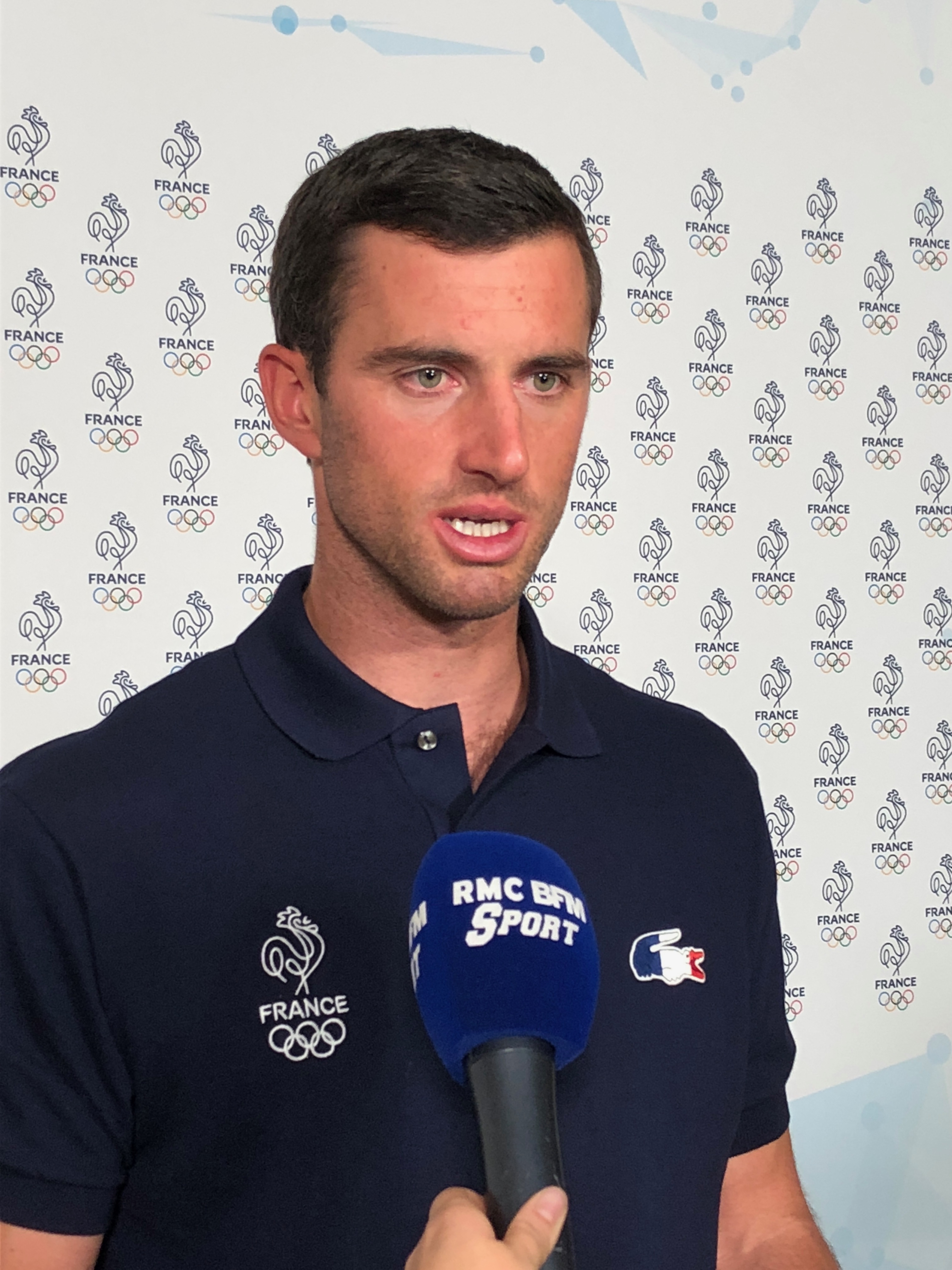 Le champion olympique 2014 de snowboard cross Pierre Vaultier en octobre 2017 à Paris